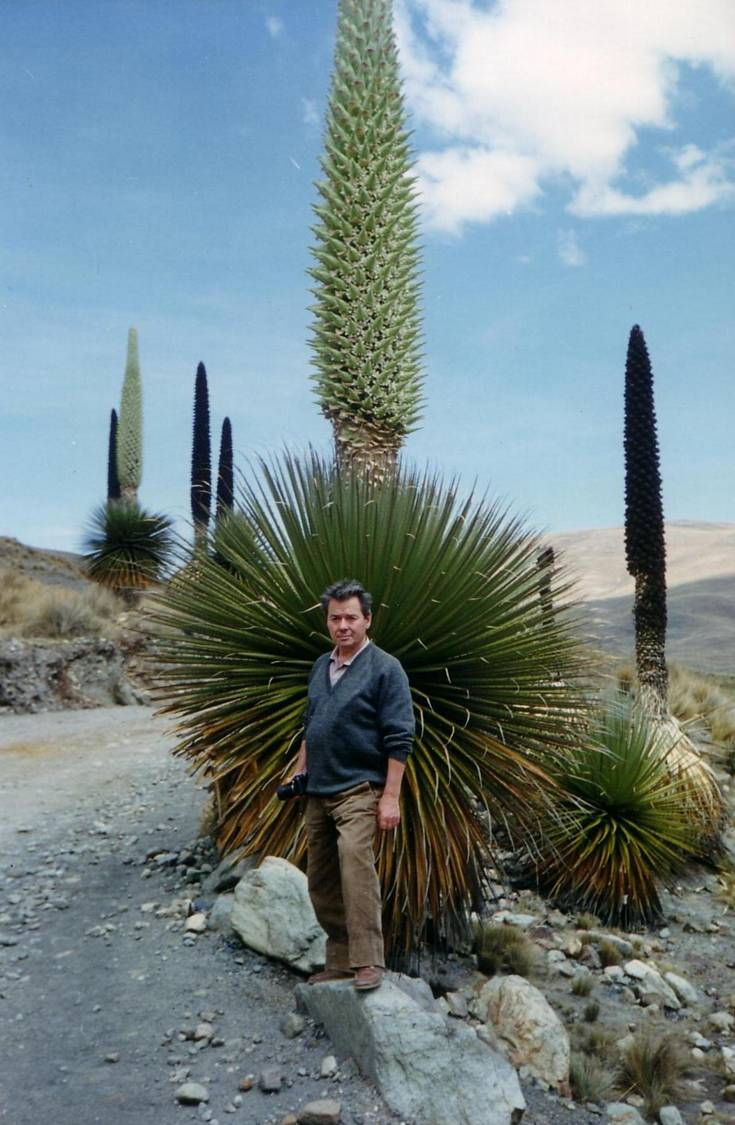 Luigi Paicenza presso il Parco nazionale del Huascarán - Puya_raimondii